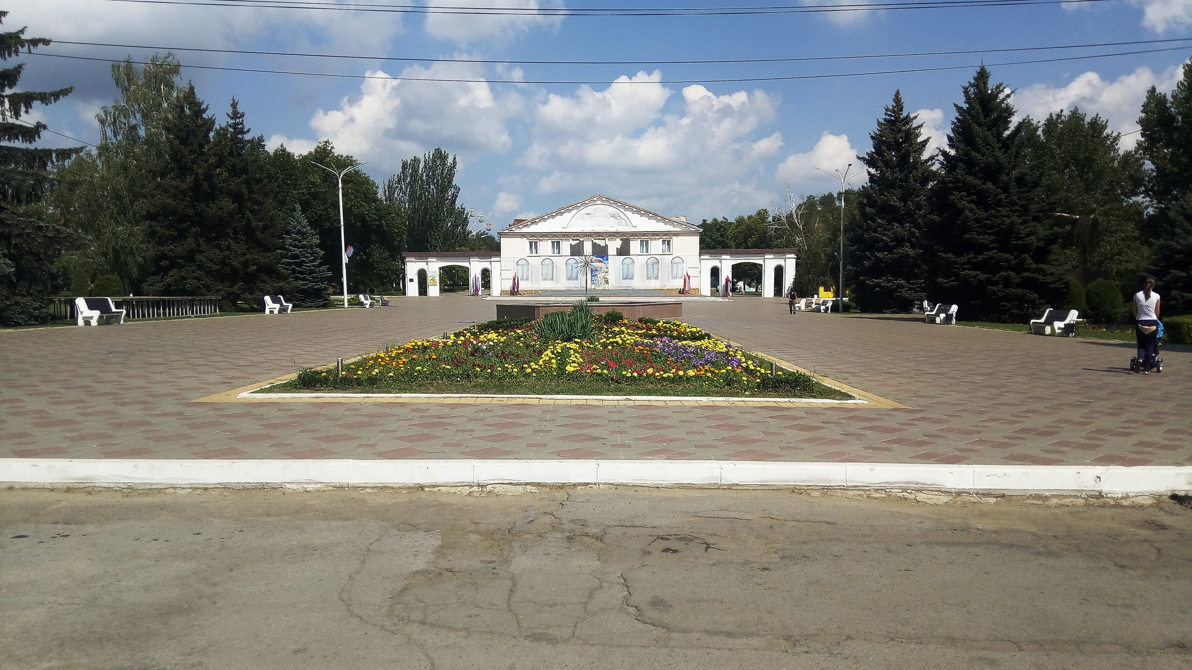 Площадь Ленина (Донецк РФ)